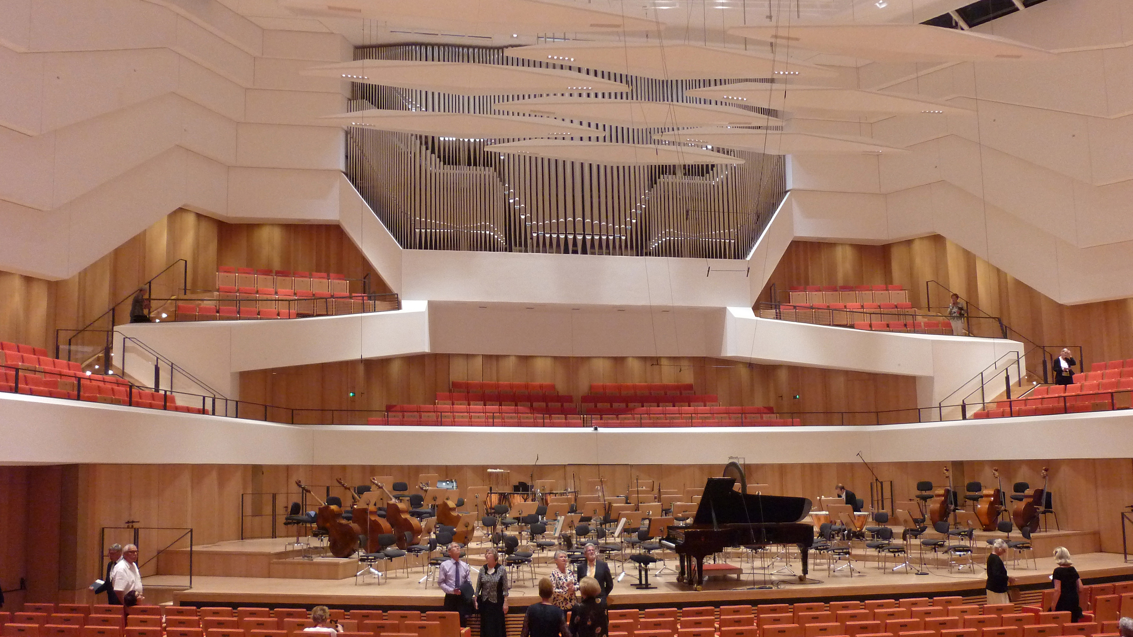 Kulturpalast Dresden nach der Wiedereröffnung am 28. April 2017: Neuer Konzertsaal